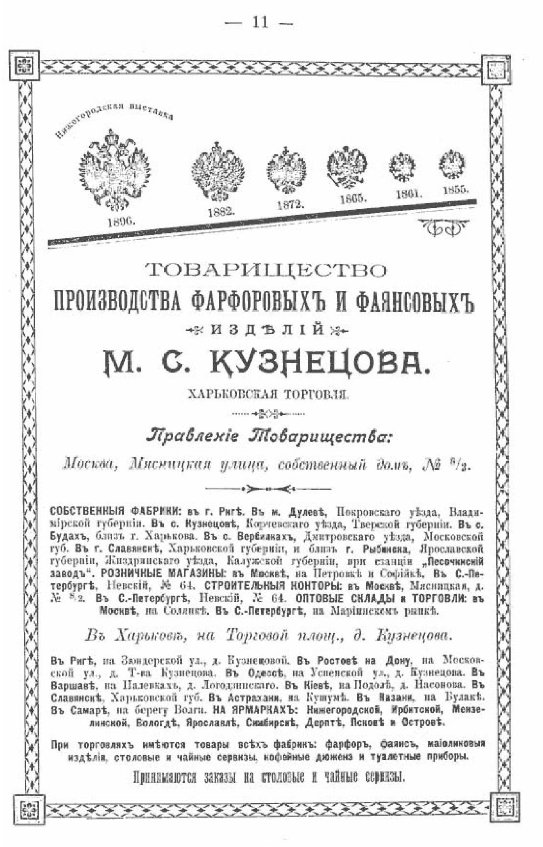 Реклама підприємства Кузнєцова (Будянський завод) у Будах, Харківська губернія.